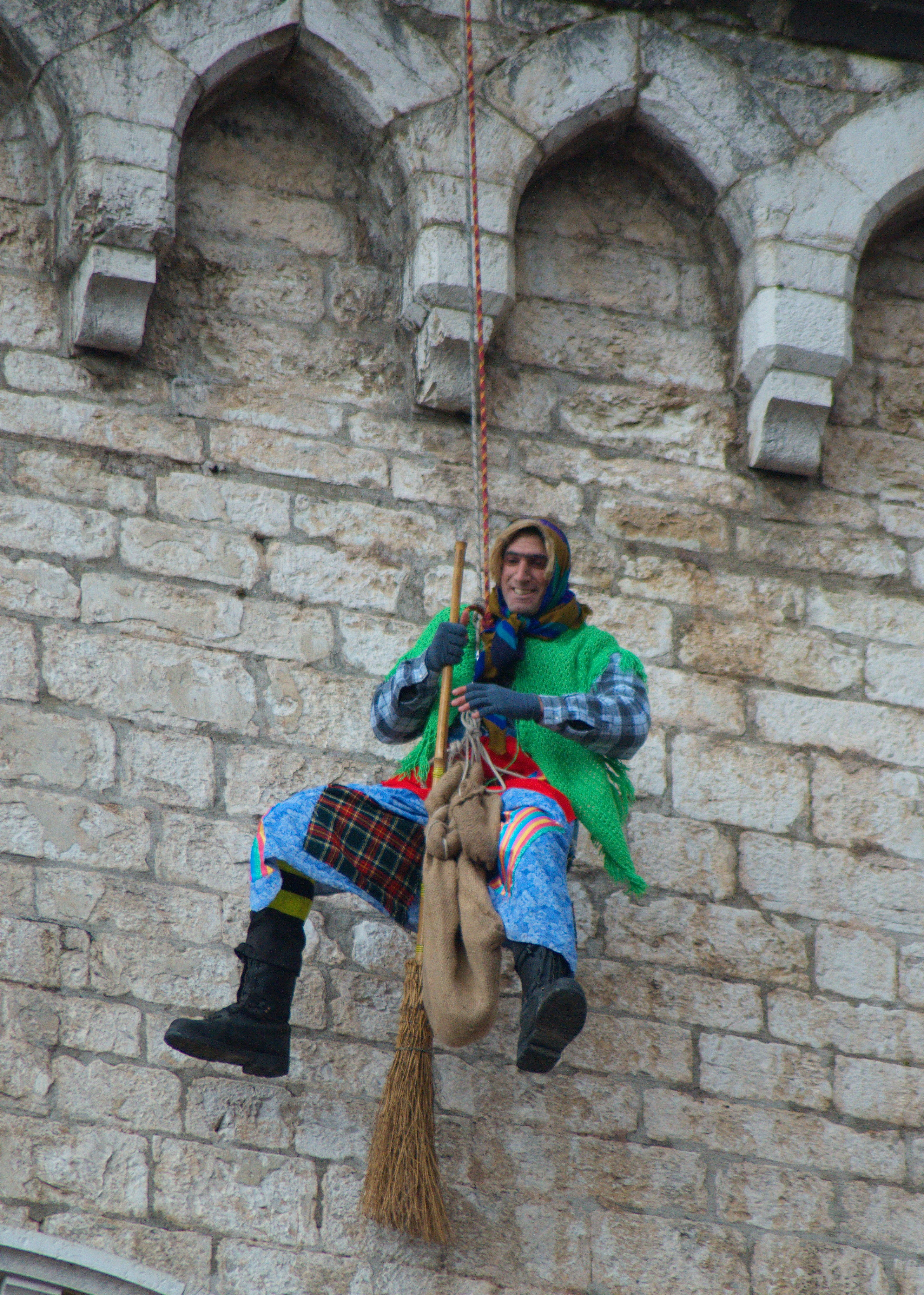 Un pompiere eugubino nei panni della Befana si cala dal Palazzo dei Consoli a Gubbio